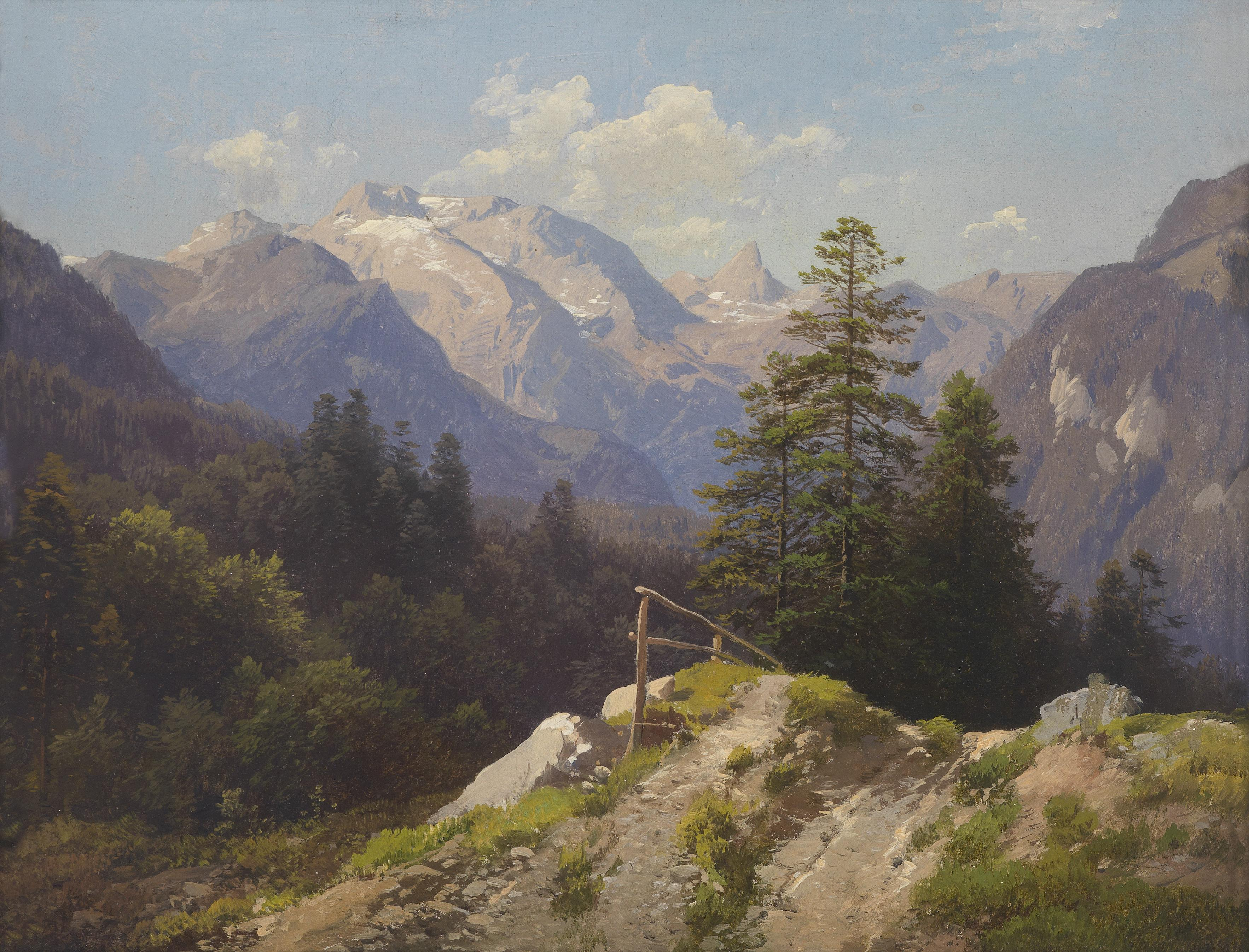 Gebirgsmotiv, rückseitig Klebeetikett mit Betitelung: Prof. Waagen die ... Tauern von Berchtesgaden aus